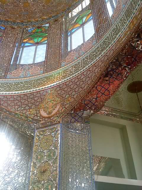 امامزاده سلطان سید محمد - قزوین